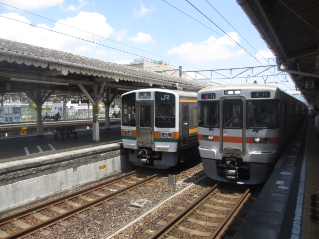 沼津駅の東海道本線ホーム